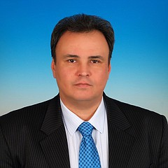 Валентин Свиридов